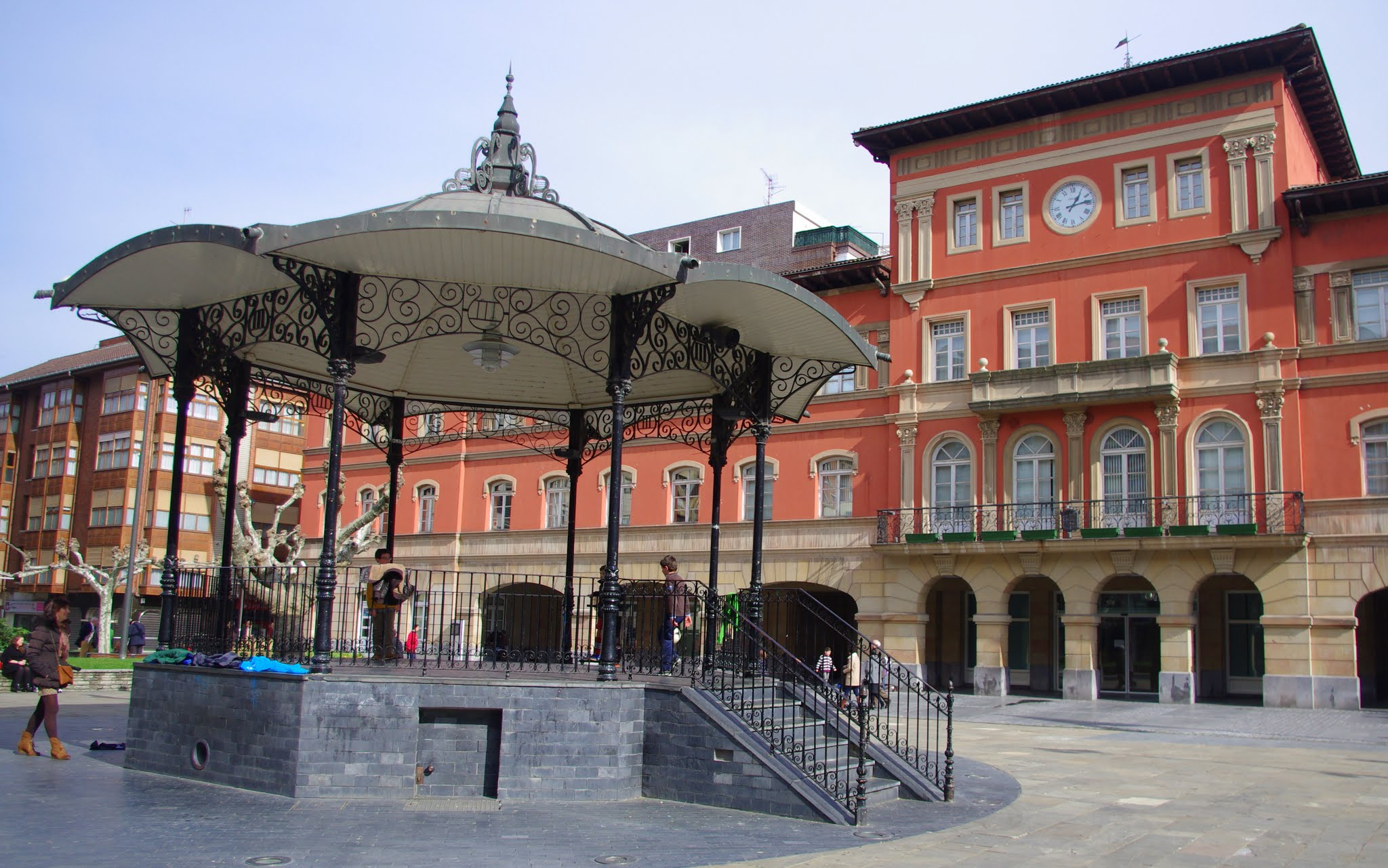 Ayuntamiento de Erandio